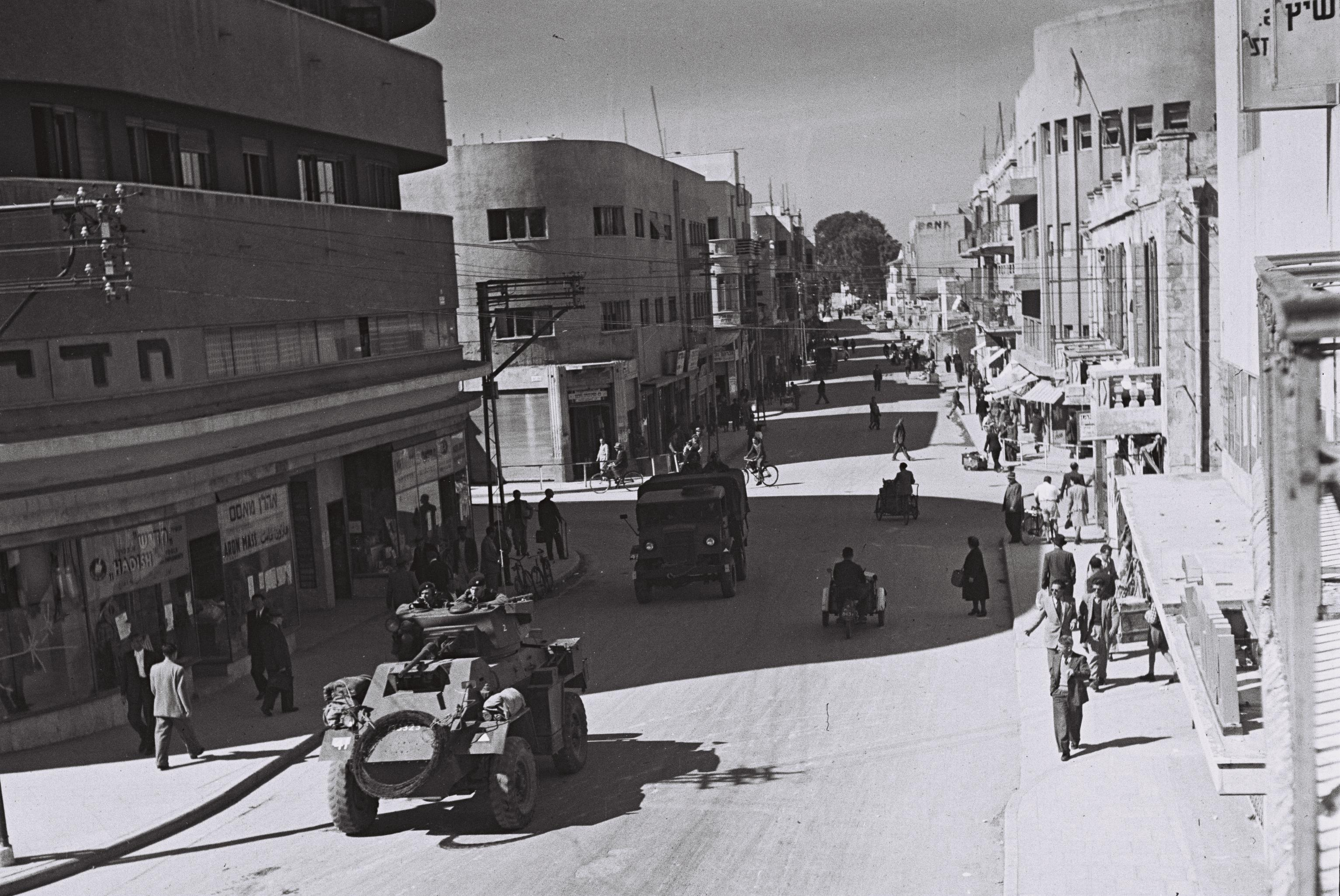 British armoured vehicles patrolling Nahalat Benyamin Street in Tel Aviv during 3-hour-break in the curfew. מכוניות משוריונות של הצבא הבריטי מפטרלות ברחובות שכונת נחלת בנימין במהלך הפסקת העוצר